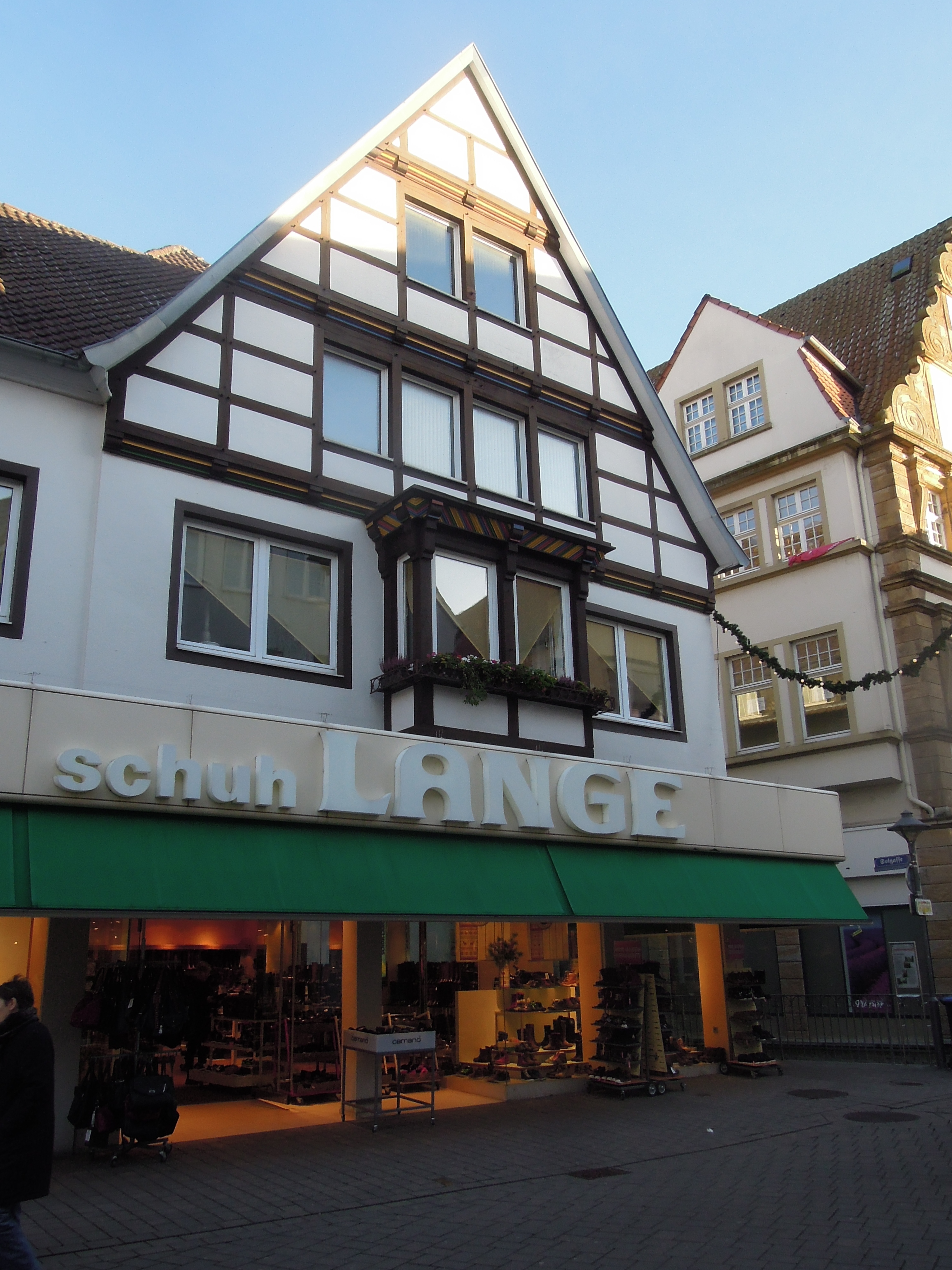 Stolpersteinlage in Soest Brüderstraße 32